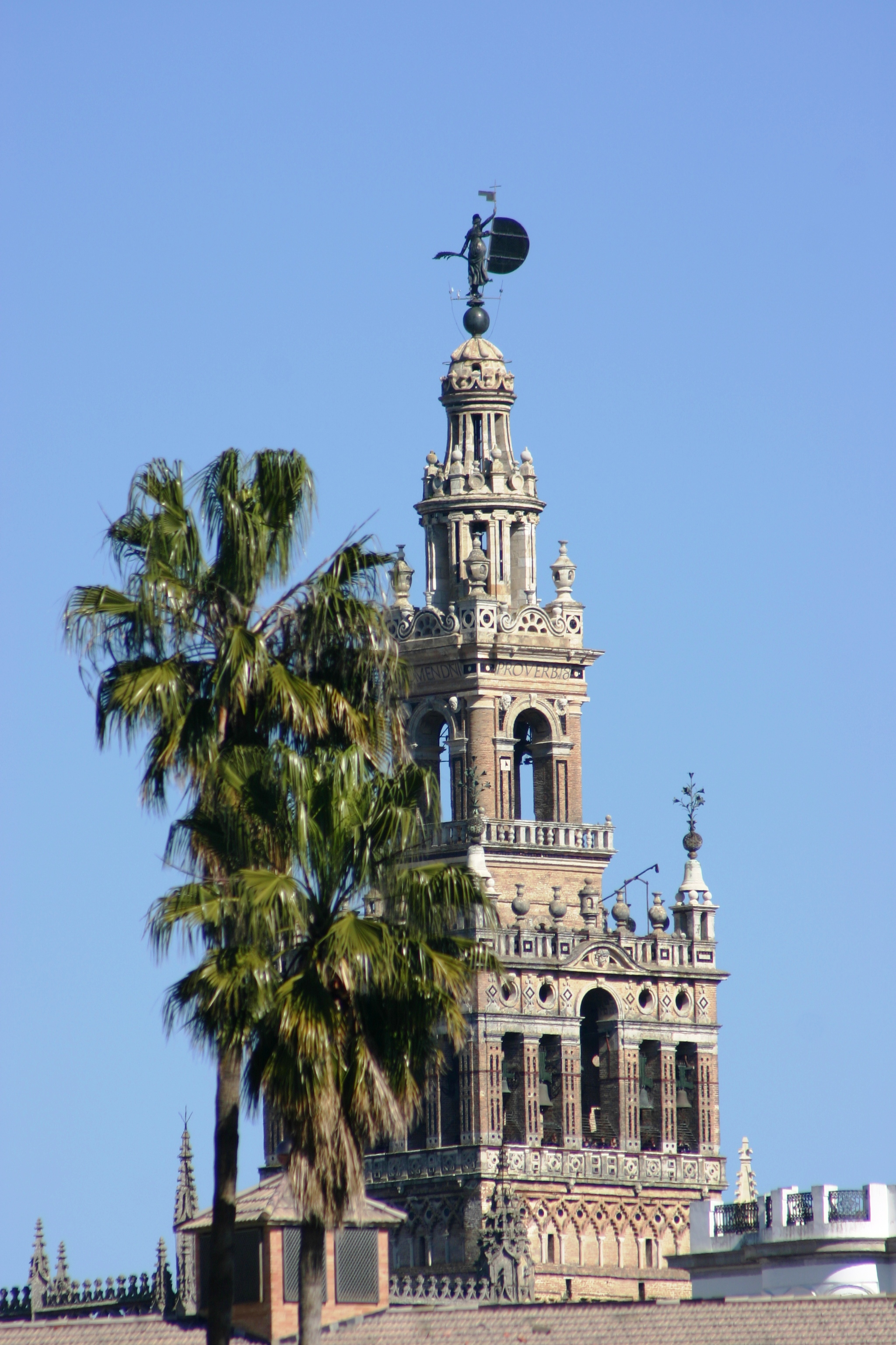 Topo da Giralda